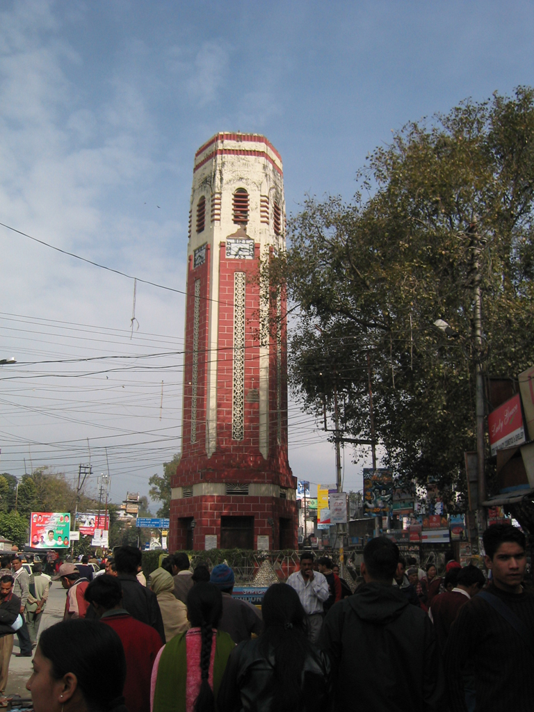 देहरादून का घंटाघर